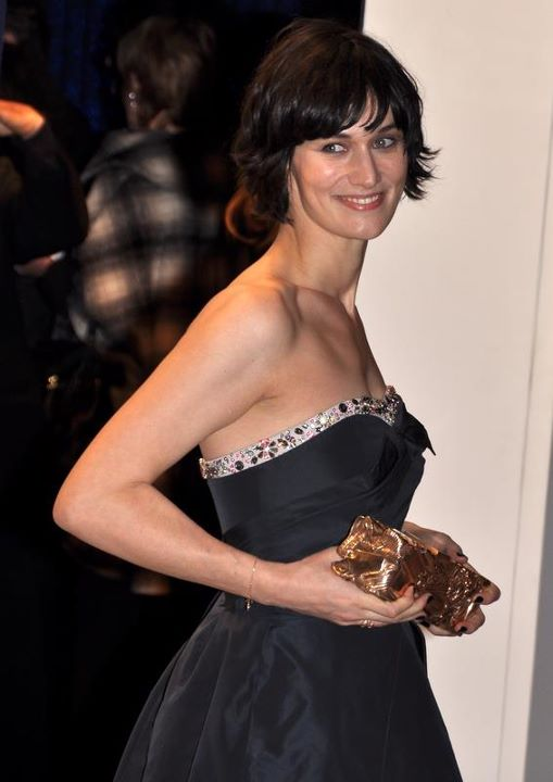 Clotilde Hesme à la cérémonie des César